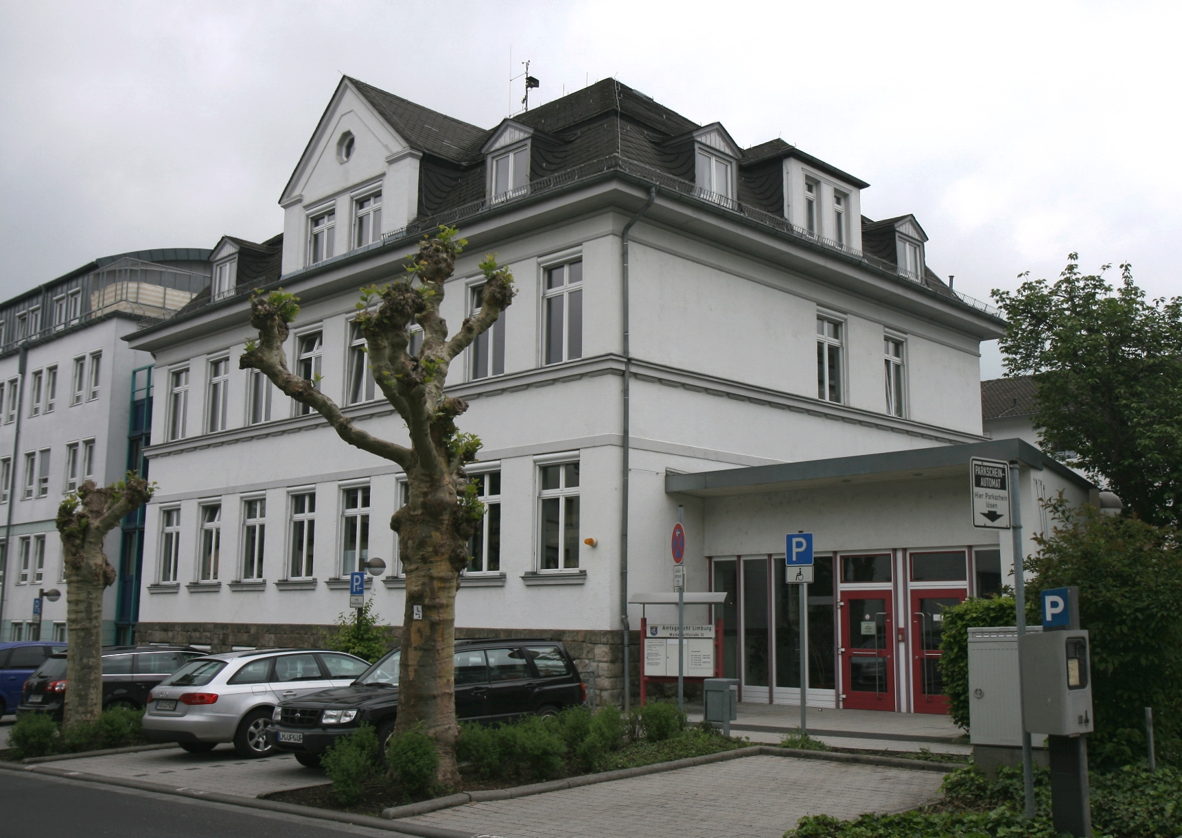 Gebäude des Amtsgerichts in Limburg an der Lahn.